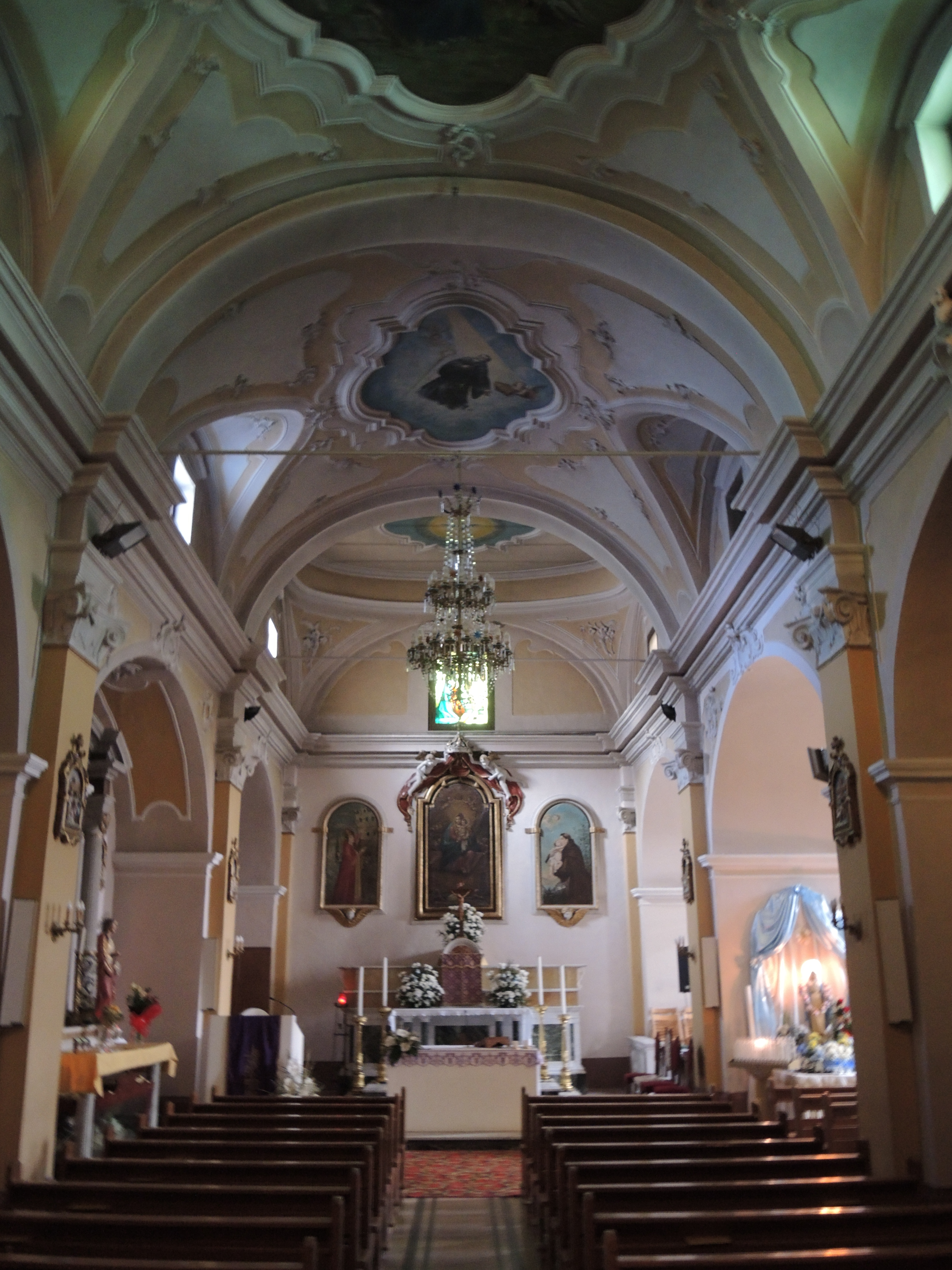 Villalago